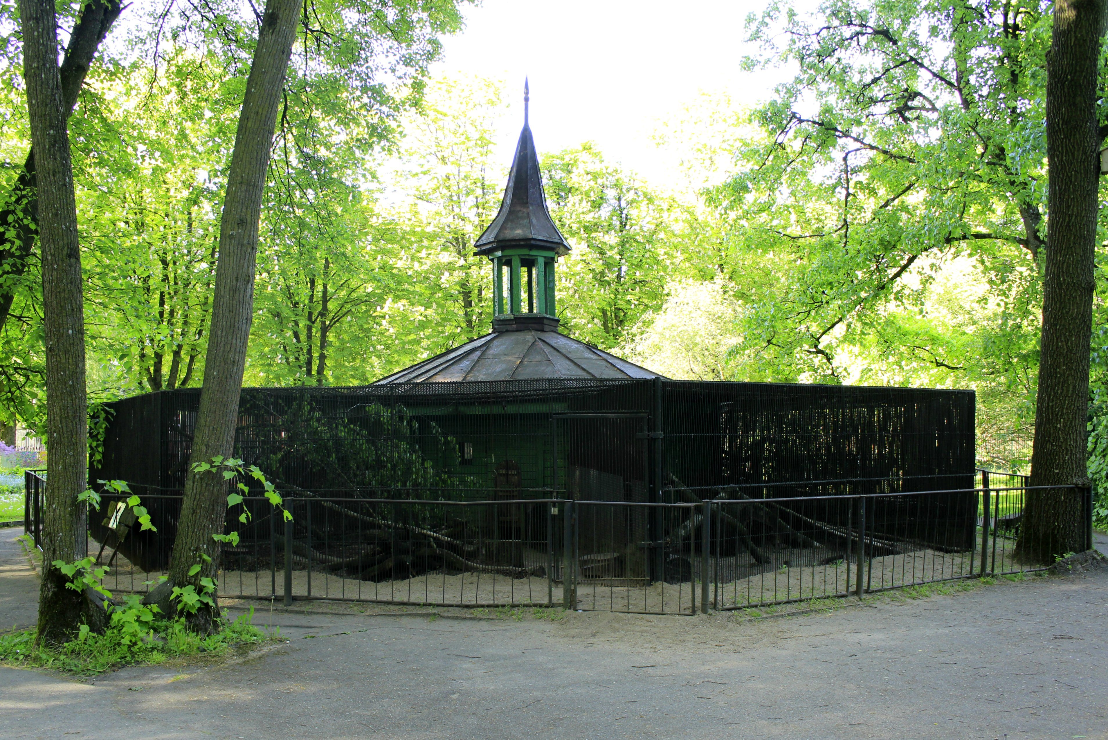 Senasis zoologijos sodo aptvaras